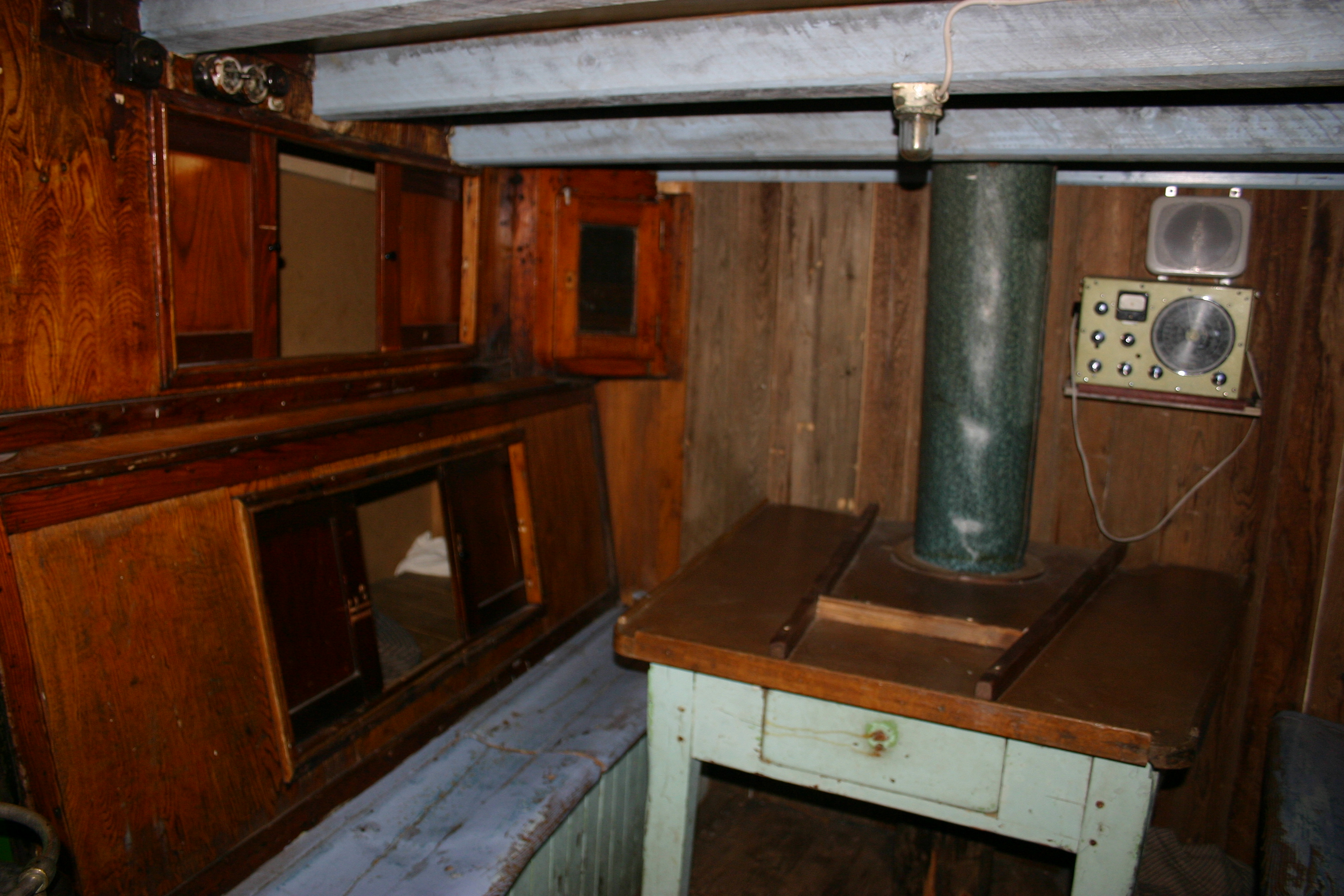 Alte Fischereiunterkunft auf Kuttern